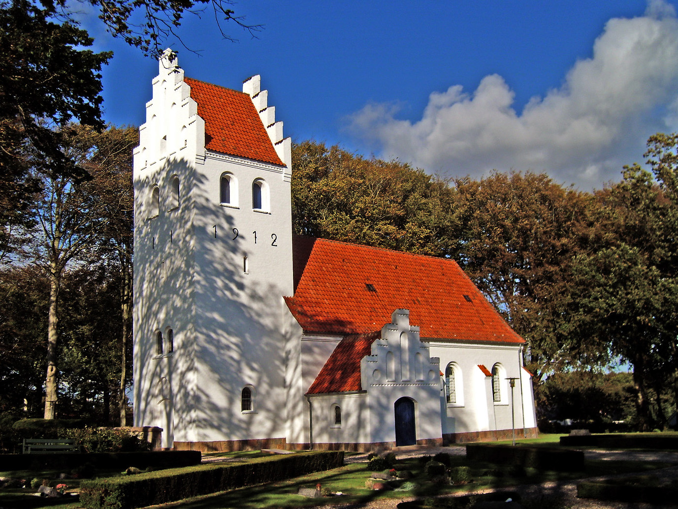 fra sydvest